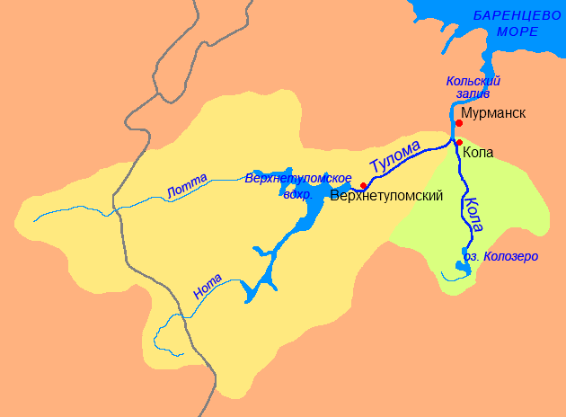 Схема бассейнов рек Тулома и Кола